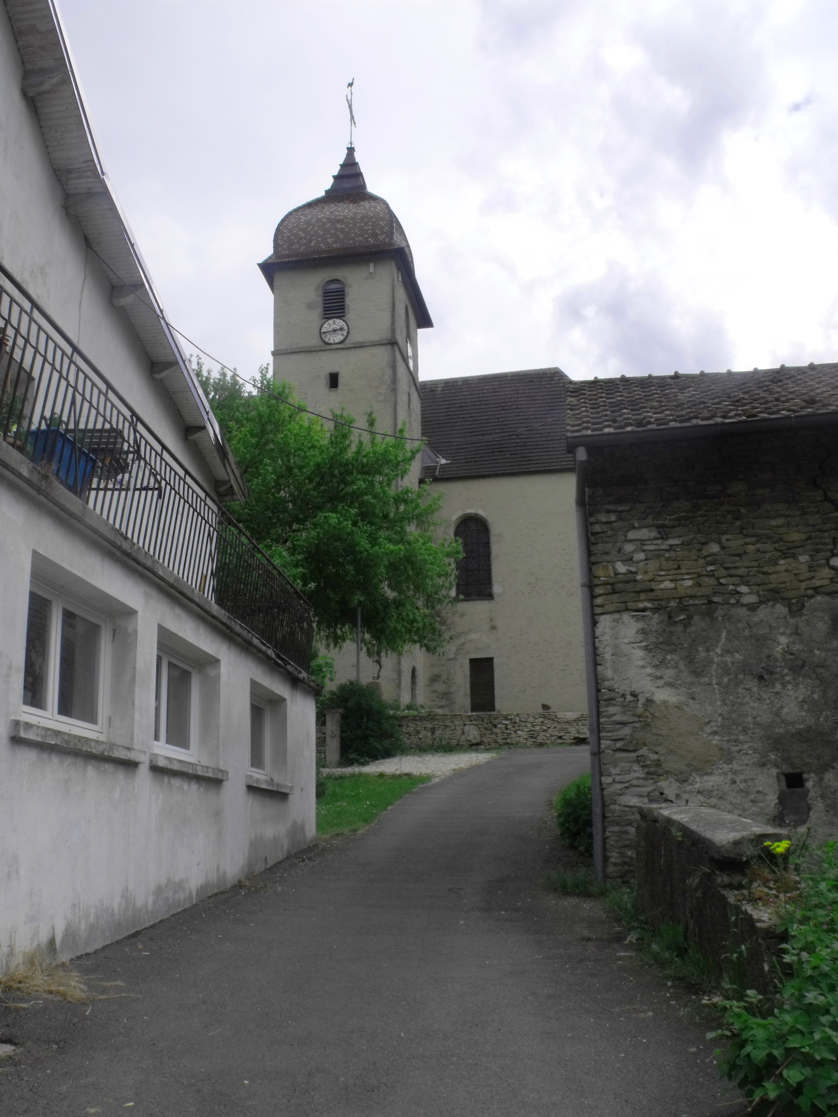 Eglise de Dambelin, Doubs, France